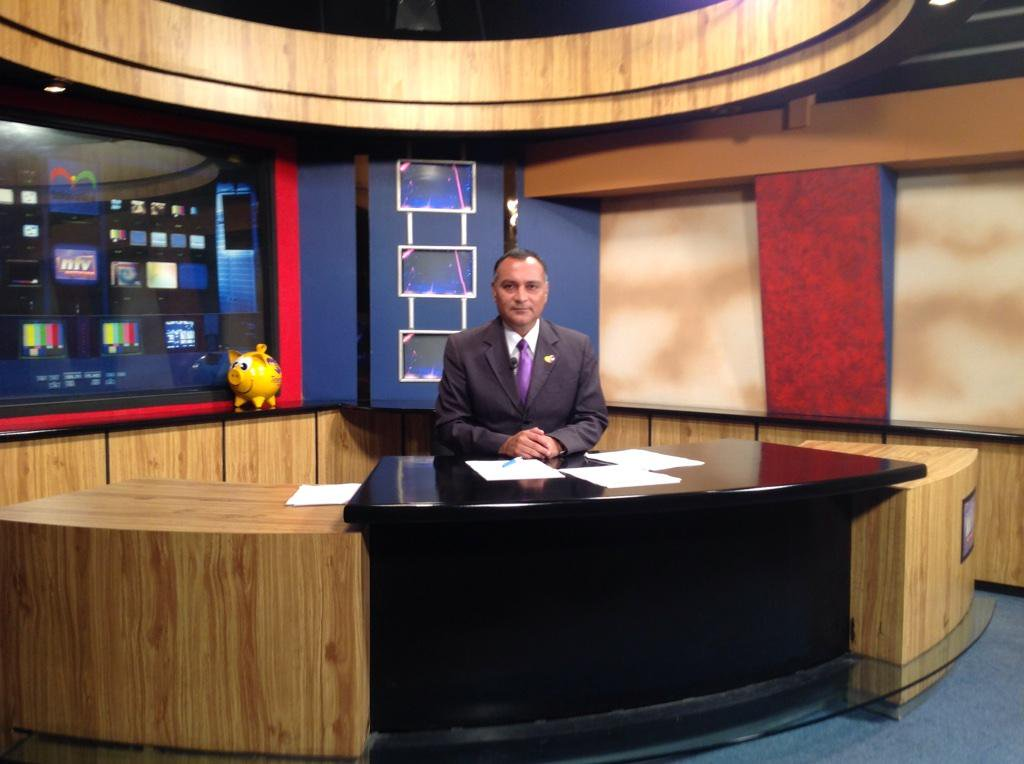 Foro del programa de televisión NTV Noticias del Canal 8, Televalles XHVSL